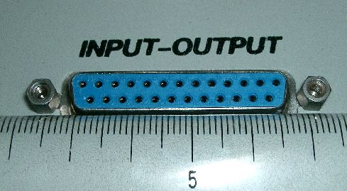 DSUB25 pin